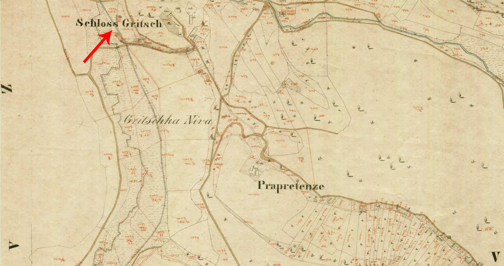 Reambulančni kataster za Kranjsko, 1867-1882